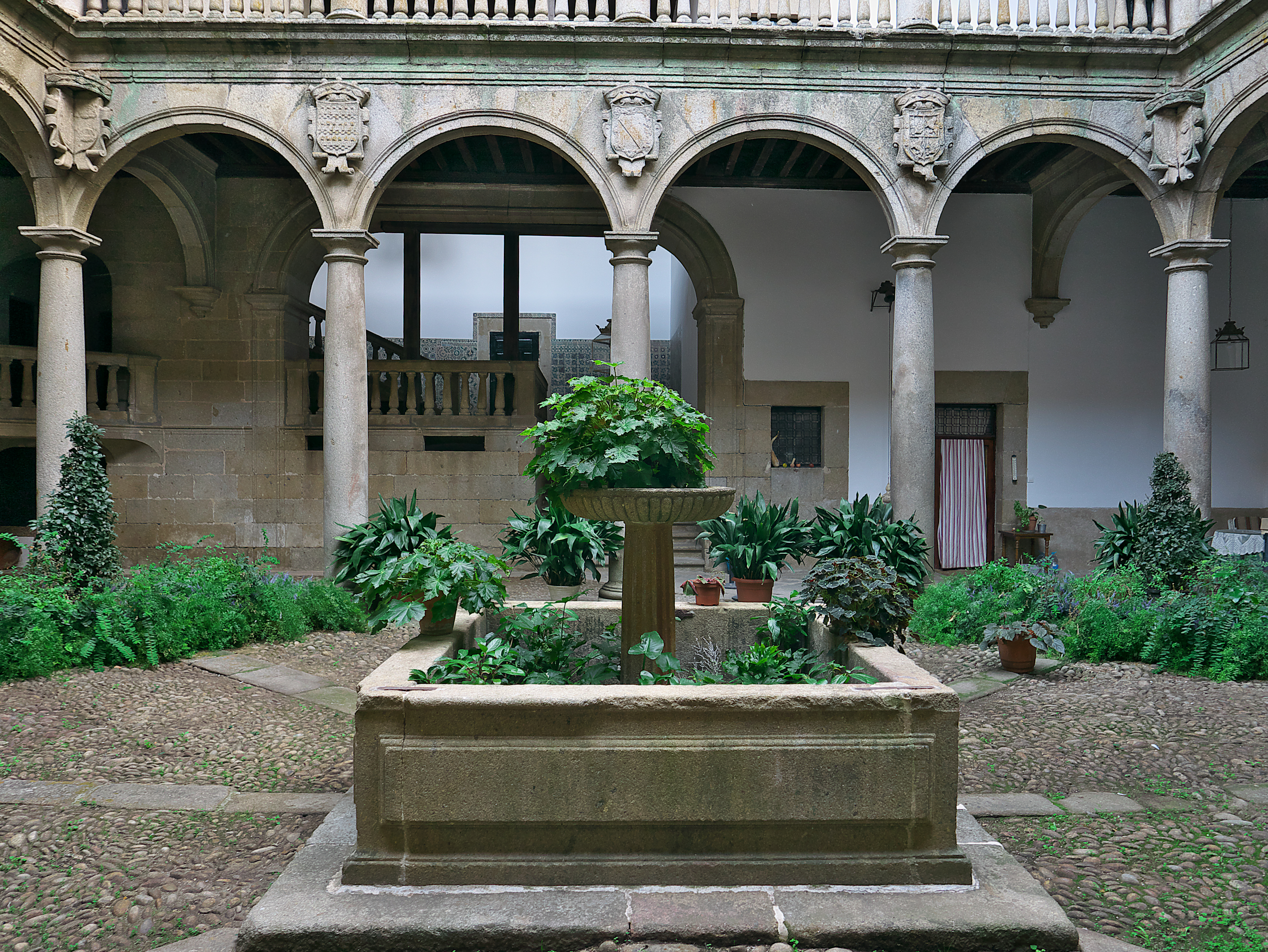 Luis de Ávila y Zúñiga y María de Zúñiga Manuel y Sotomayor construyen su palacio bajo los cánones renacentistas.